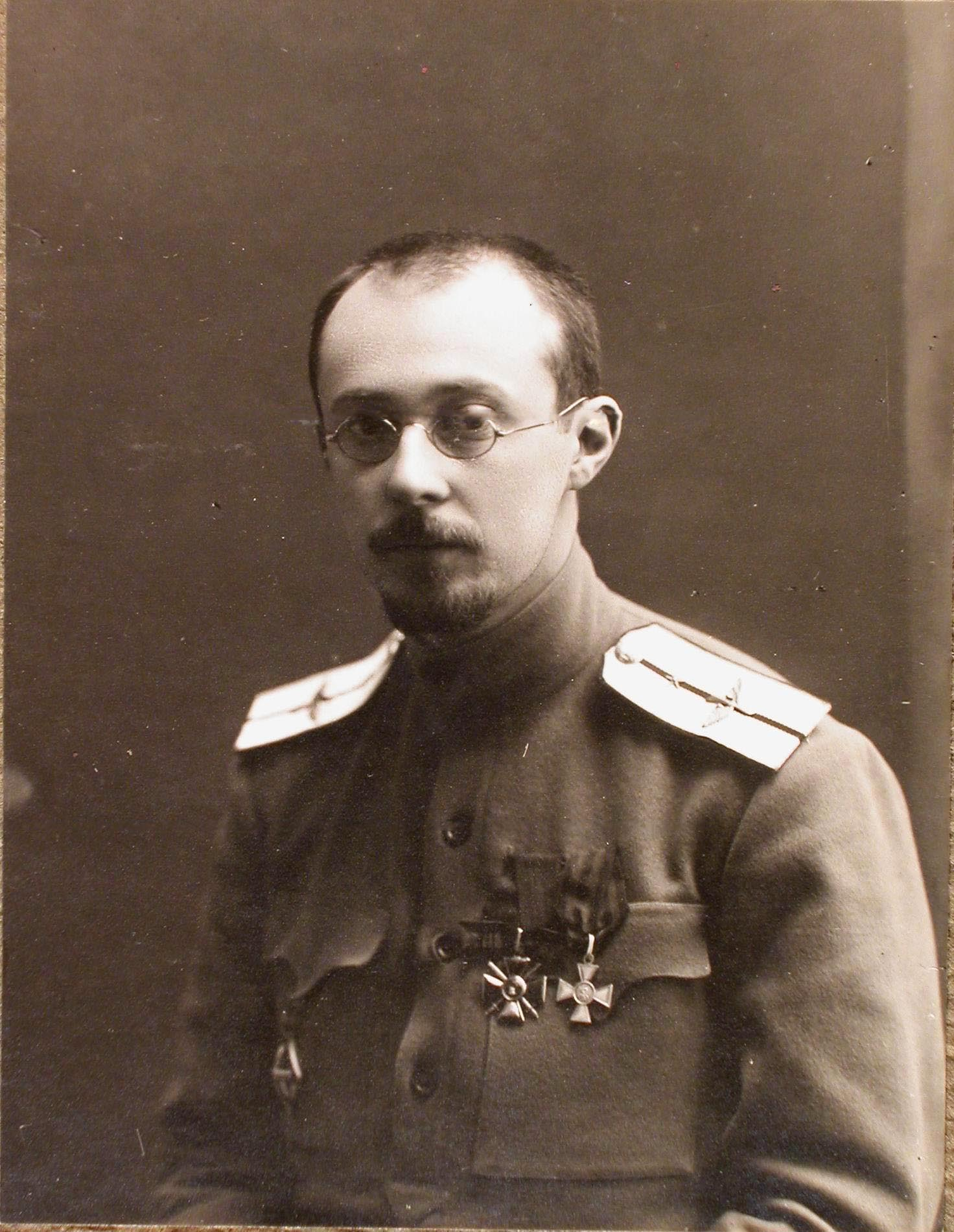 Портрет прапорщика А.А. Фридмана, преподавателя киевской военной школы лётчиков-наблюдателей